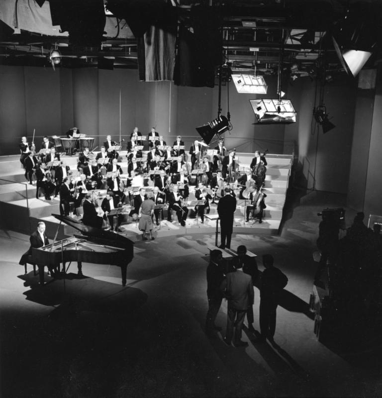 Südwestfung-Fernsehstudio Baden-Baden, 1964 Im Ernst-Becker-Fernsehstudio des Südwestfunks Baden-Baden probt das Sinfonieorchester des Südwestfunks für eine Mozart-Aufnahme mit dem Pianisten Rudolf Fircusny. Der Dirigent ist Ernest Bour.